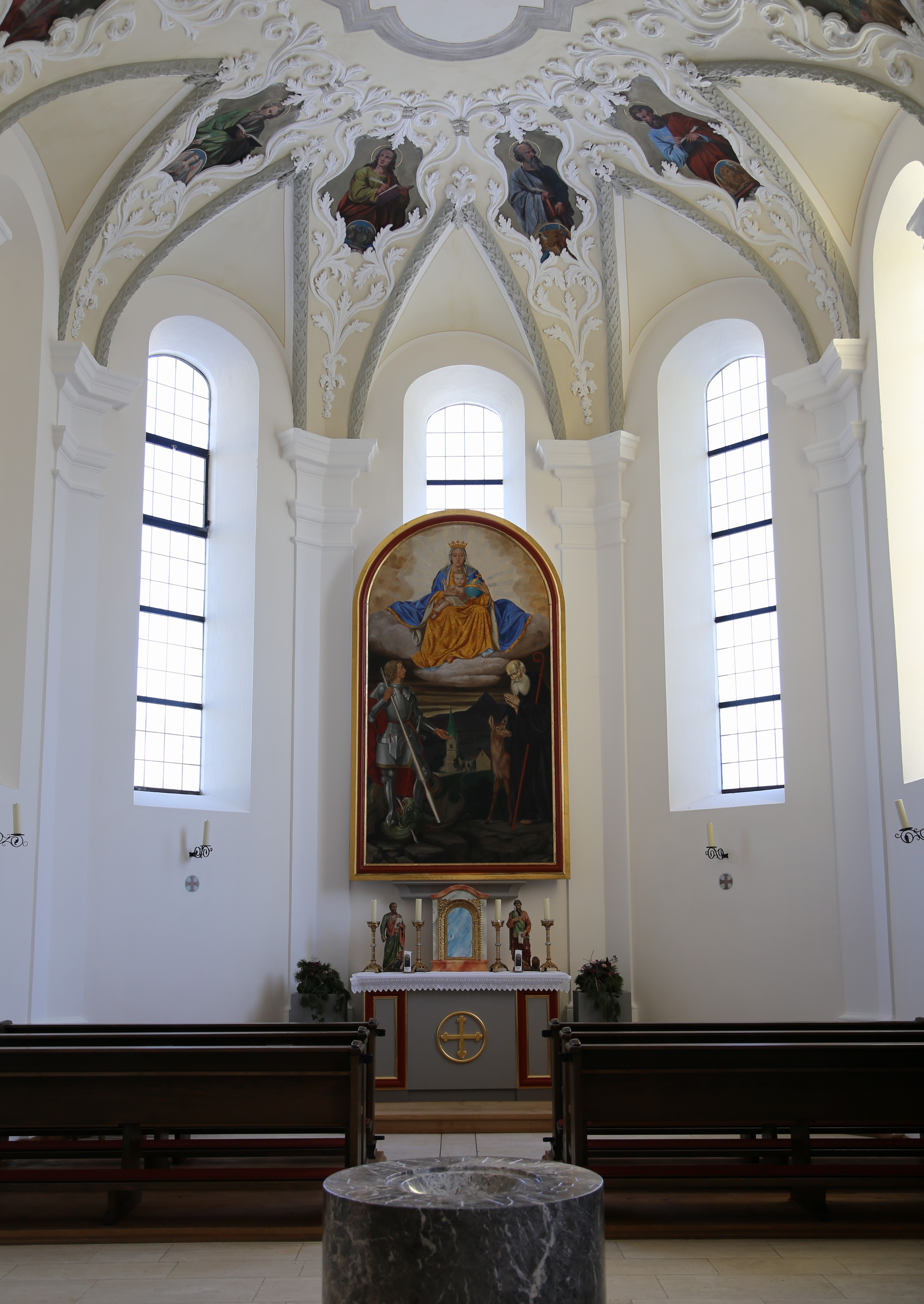 Kath. Pfarrkirche hl. Ägidius, Schwoich